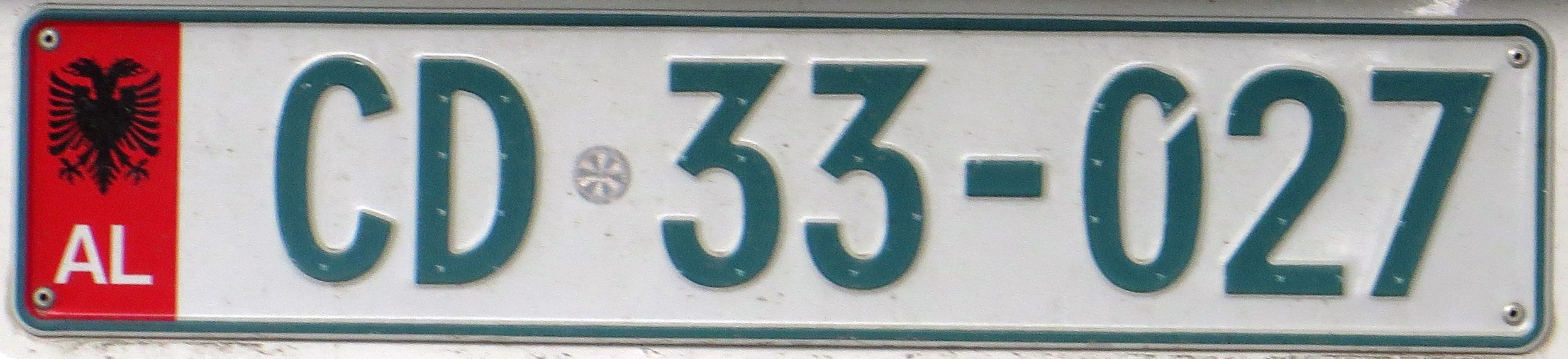 CD kentekenplaat Albanië